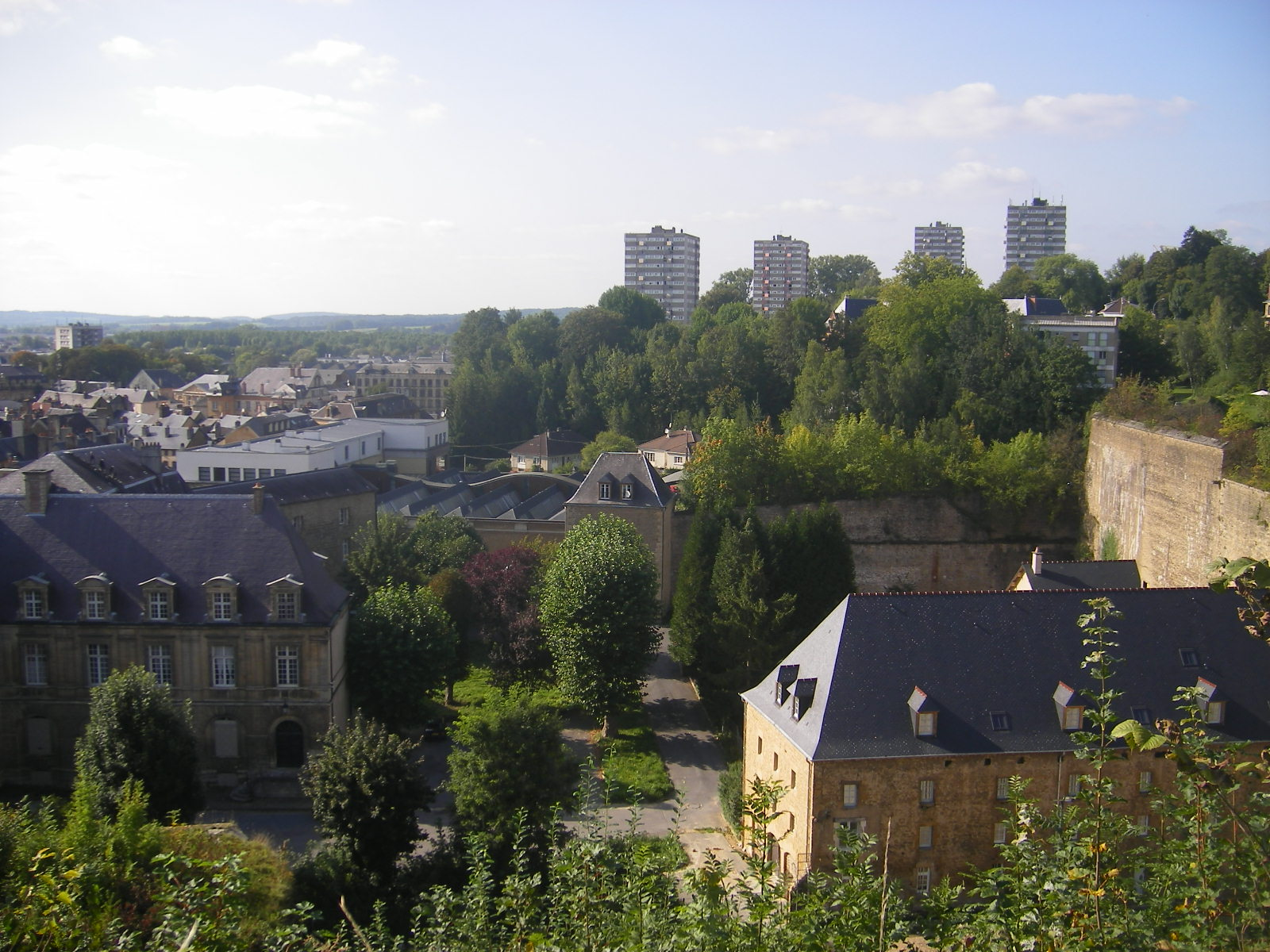 Vue de Sedan (Ardennes, France).